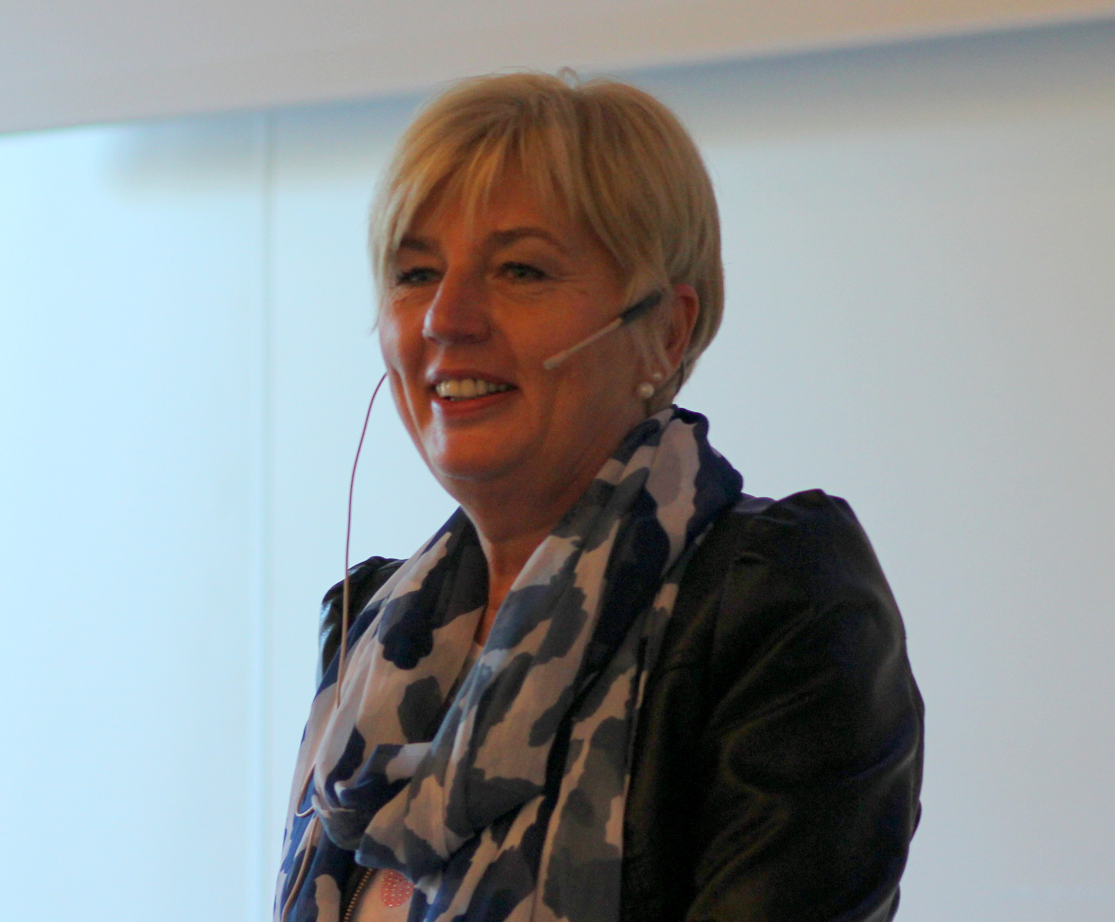 Erna Hagensen leder av Norsk Arbeidsmandsforbund i forbindelse med ett møte i Forbundsalliansen